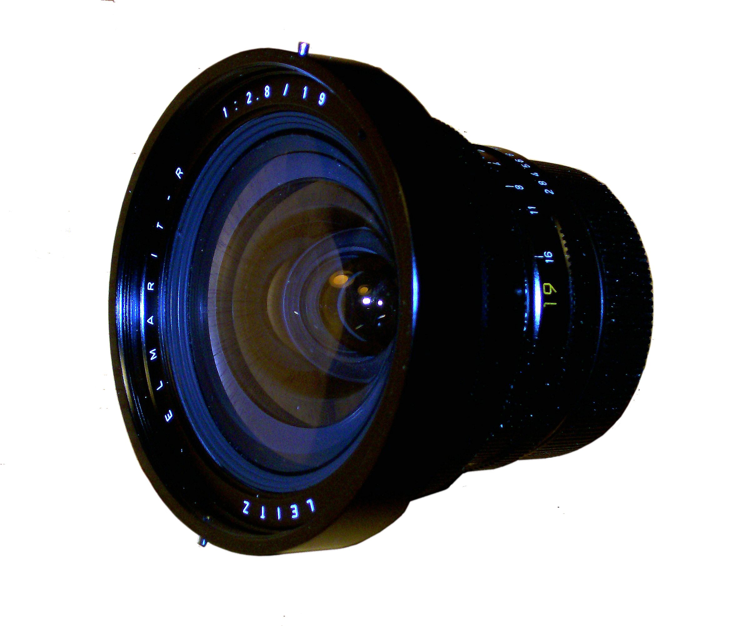 Leitz Canada Elmarit R 19mm/2.8